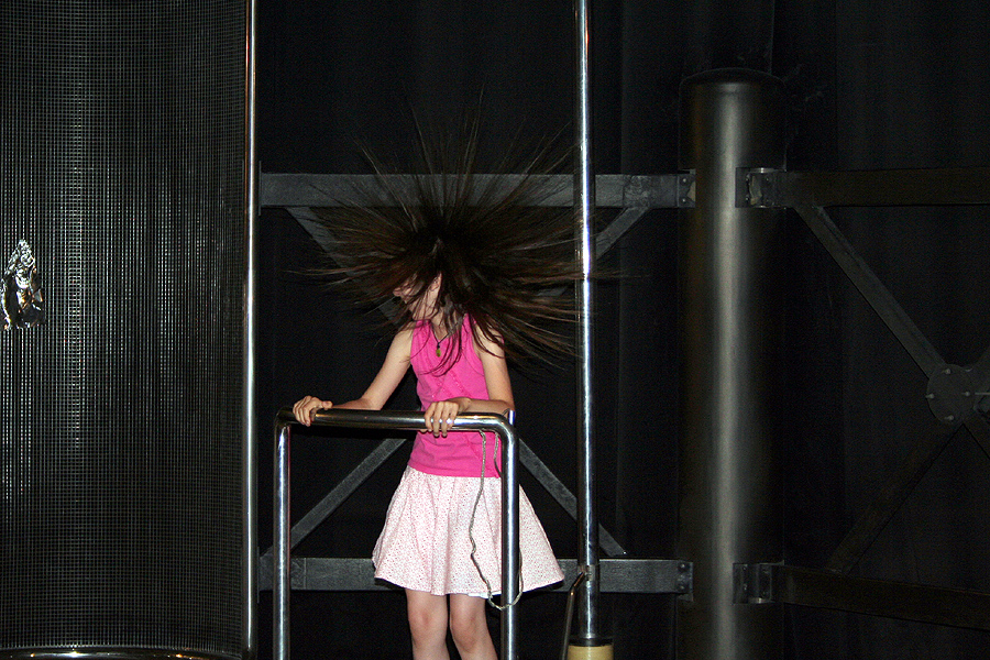 Musée de la découverte, Paris (electrostatics)